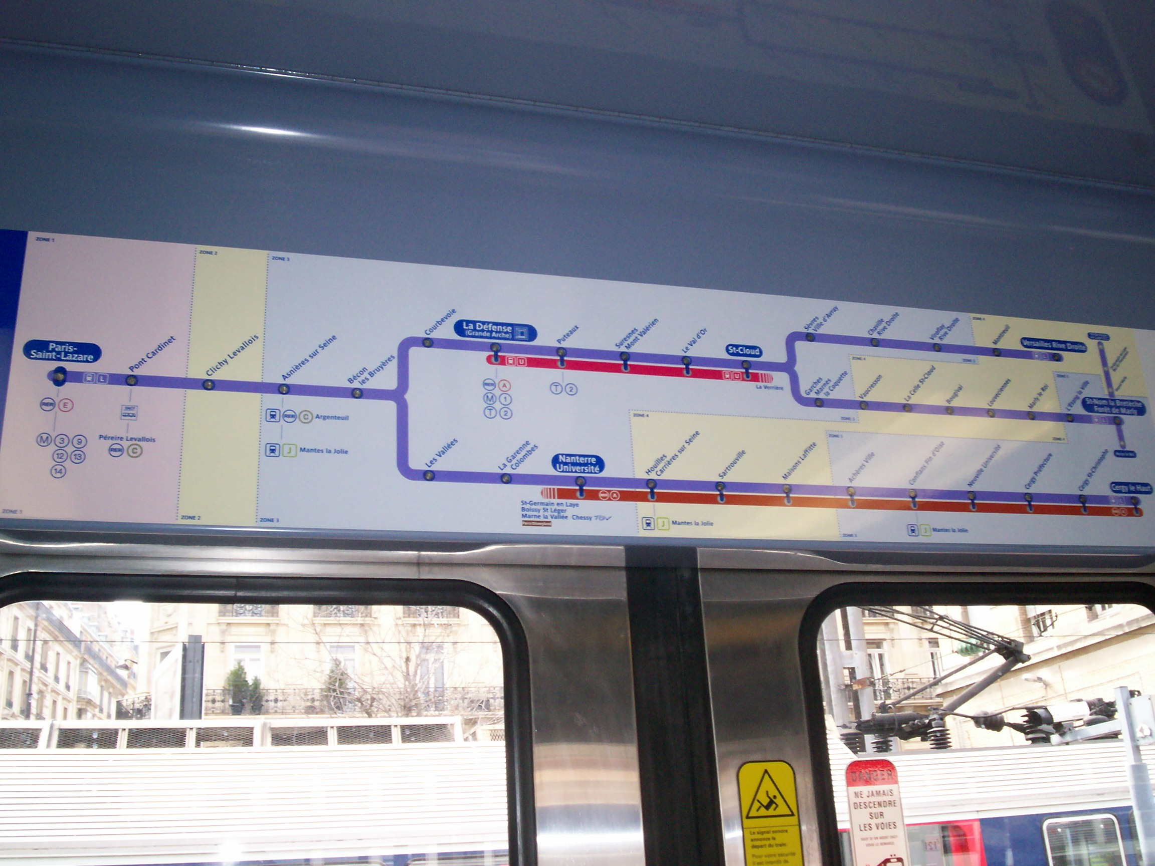 Intérieur d'un Z 6400